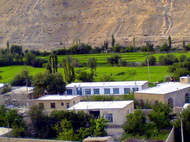 منزل مراد خان